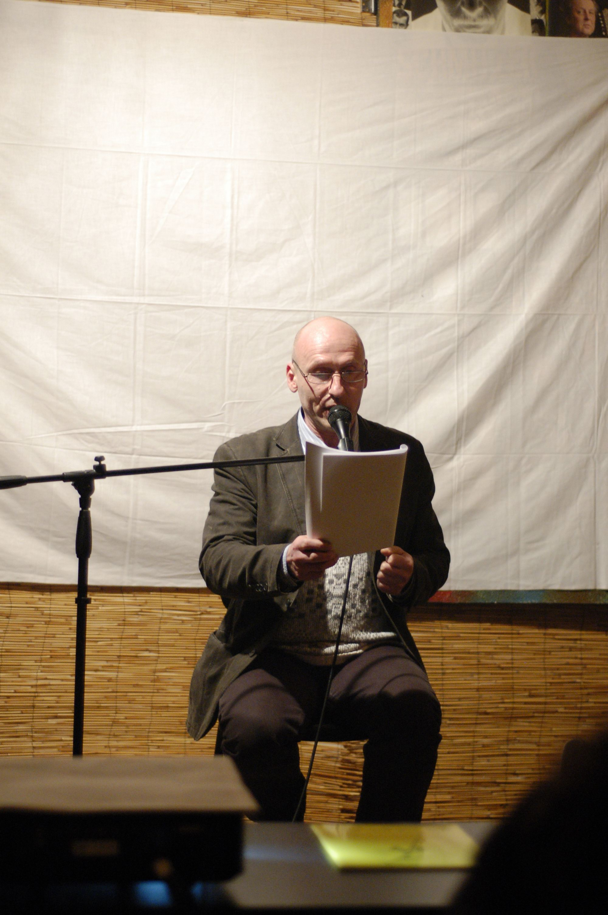 Petr Štengl